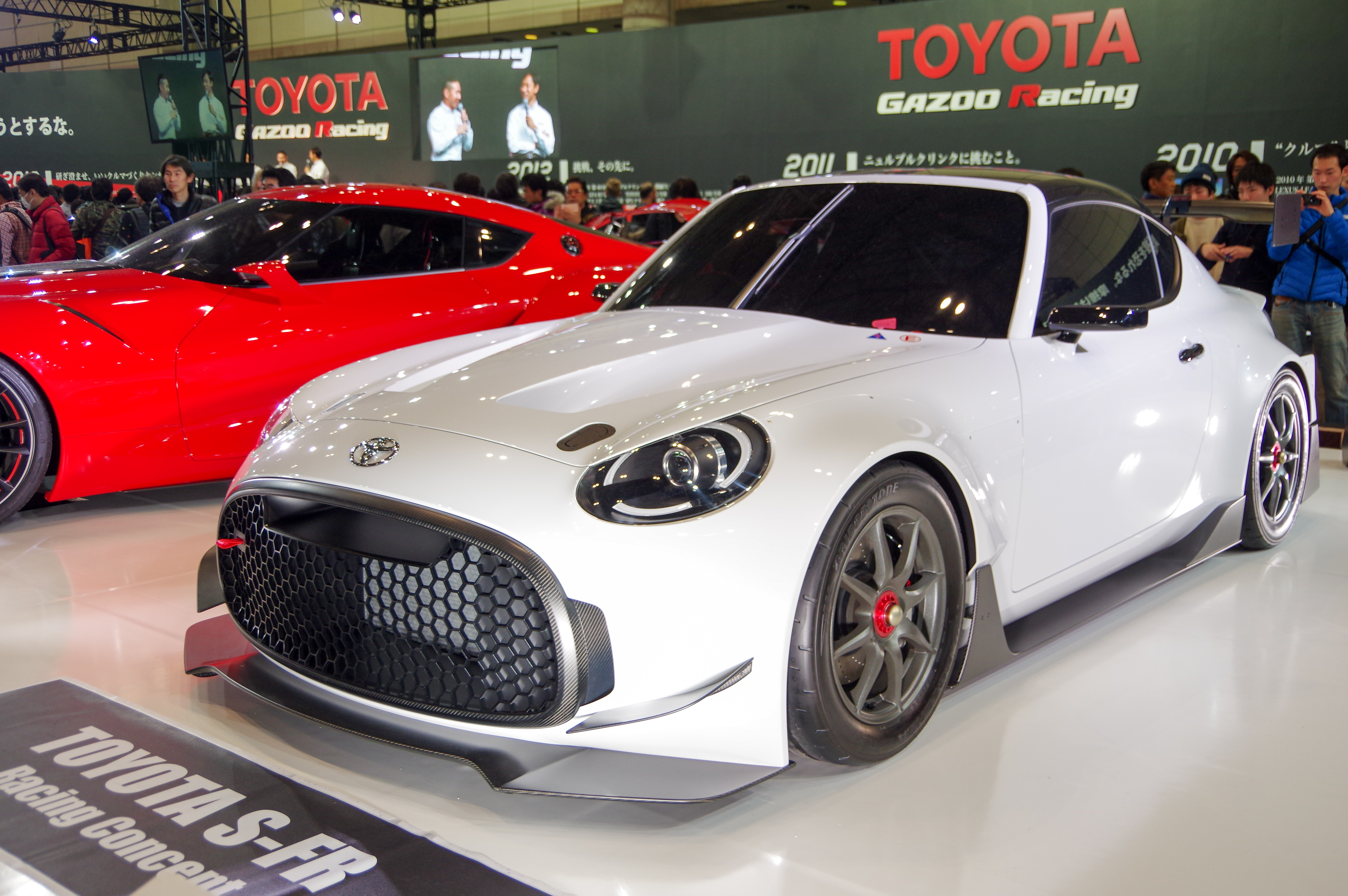 TOKYO AUTO SALON 2016 _24